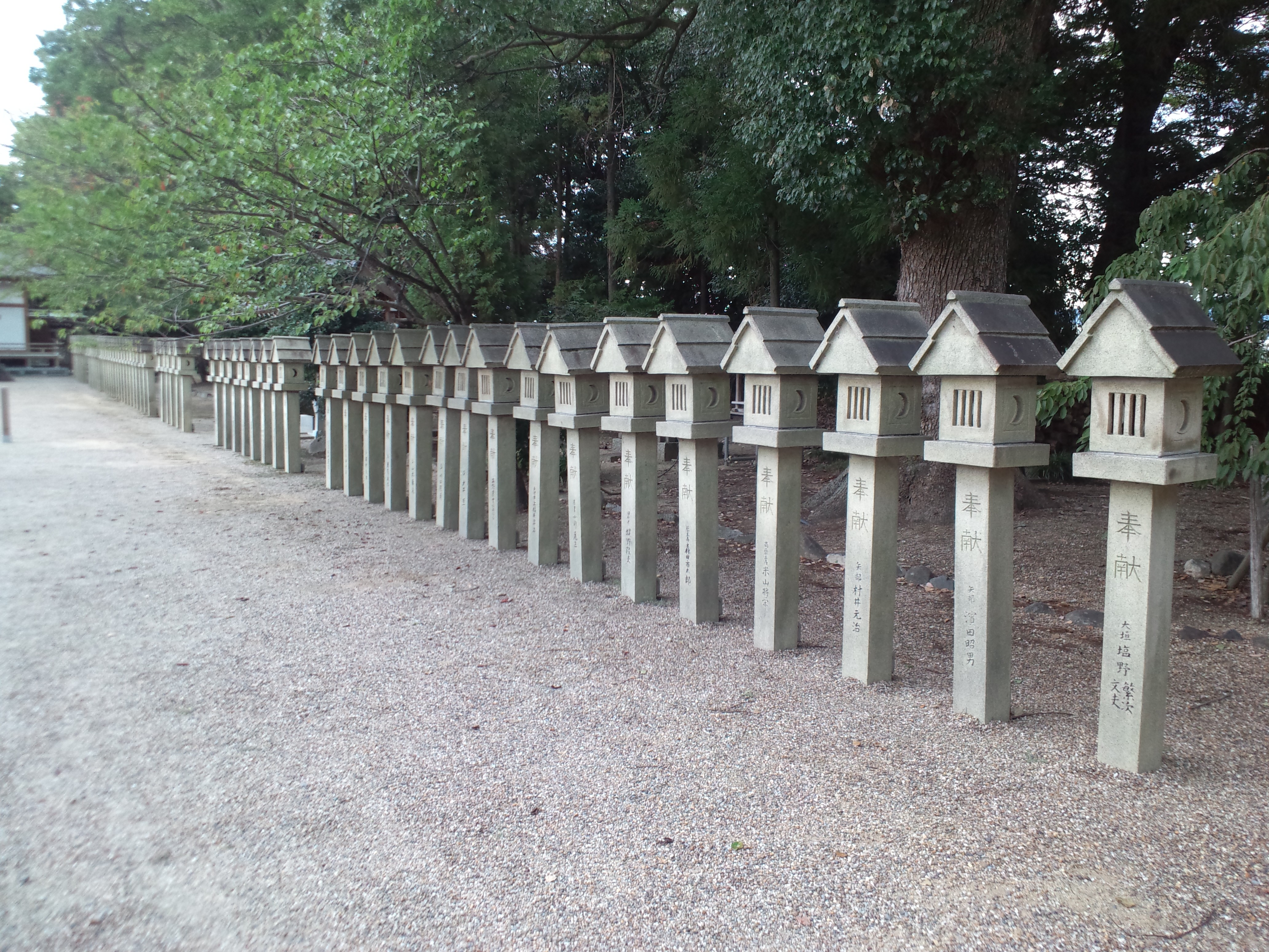 多坐弥志理都比古神社 石燈籠